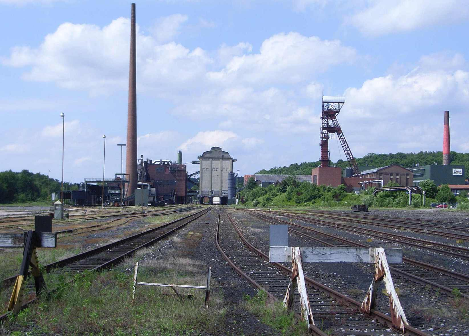 Zeche Sophia Jacoba, Hückelhoven, NRW, Verladestation, Förderturm und Brikettfabrik